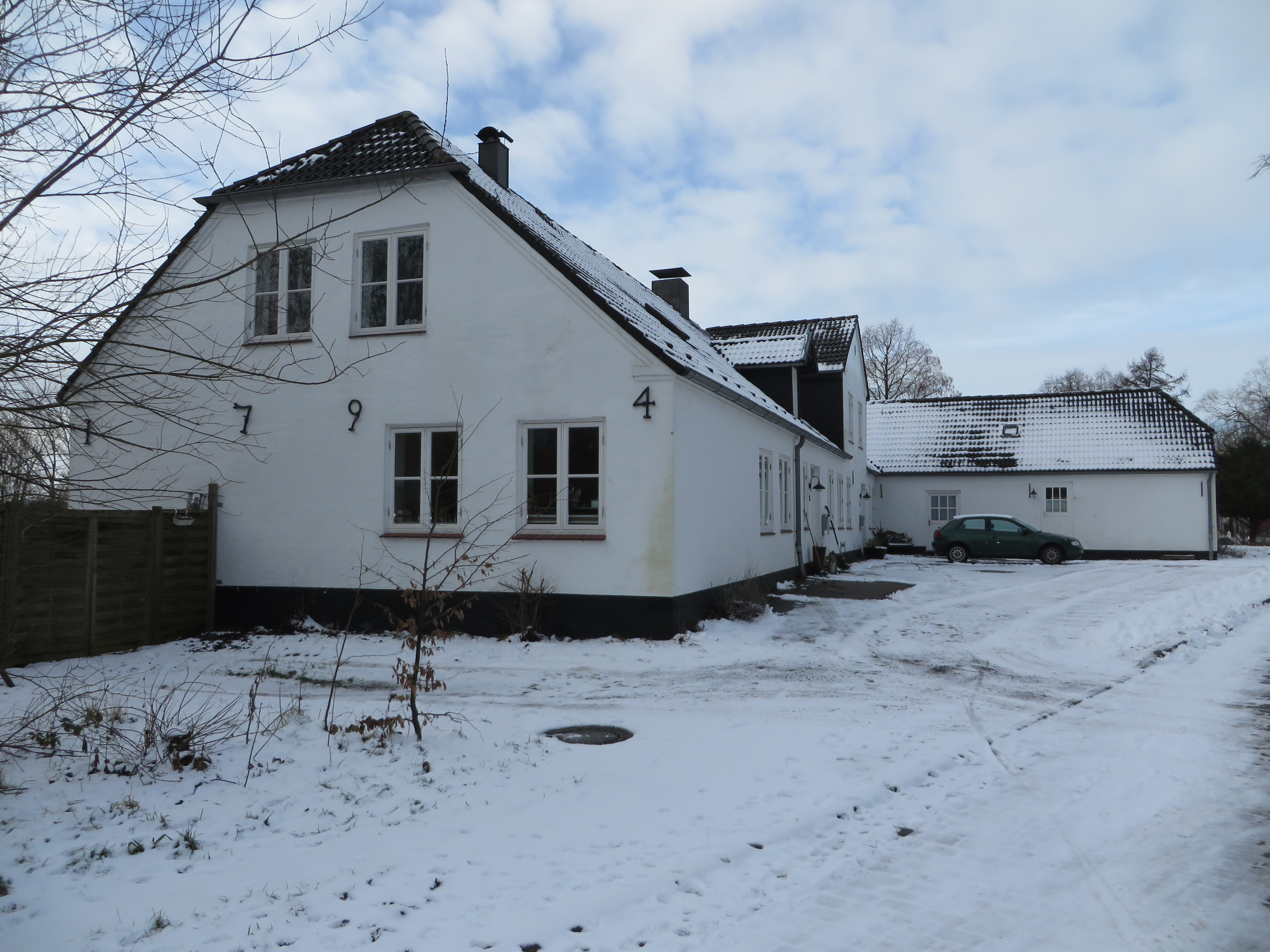 Alt-Fruerlundhof 4-8 im Schnee (Flensburg Januar 2015), Bild 01